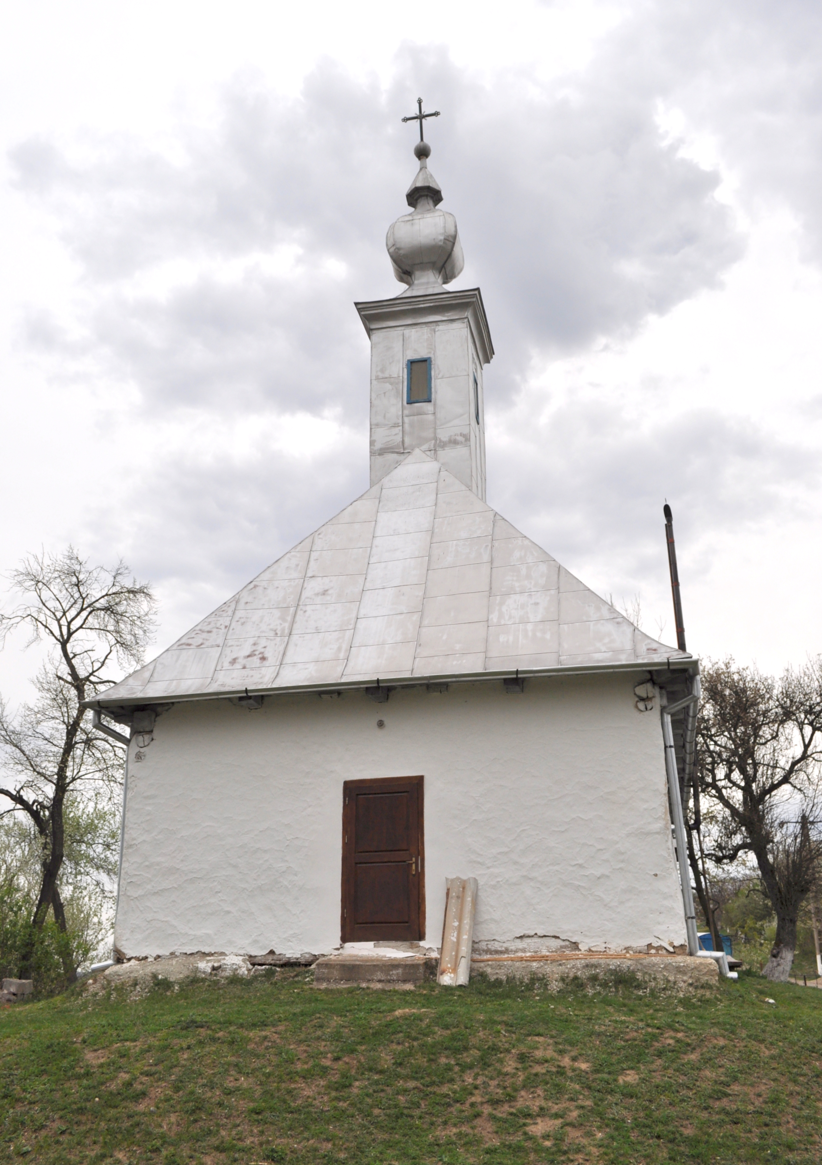 Biserica de lemn "Cuvioasa Paraschiva", sat DOBREŞTI; comuna BARA